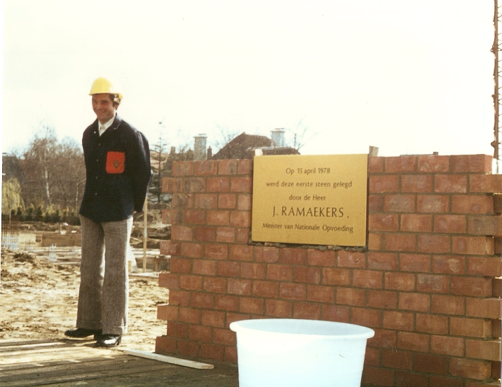 Eerste steenlegging van de huidige T-blok van het Atheneum Hof van Riemen in Heist-op-den-Berg op 15 april 1978 door J. Ramaekers, toenmalig minister van Nationale Opvoeding.